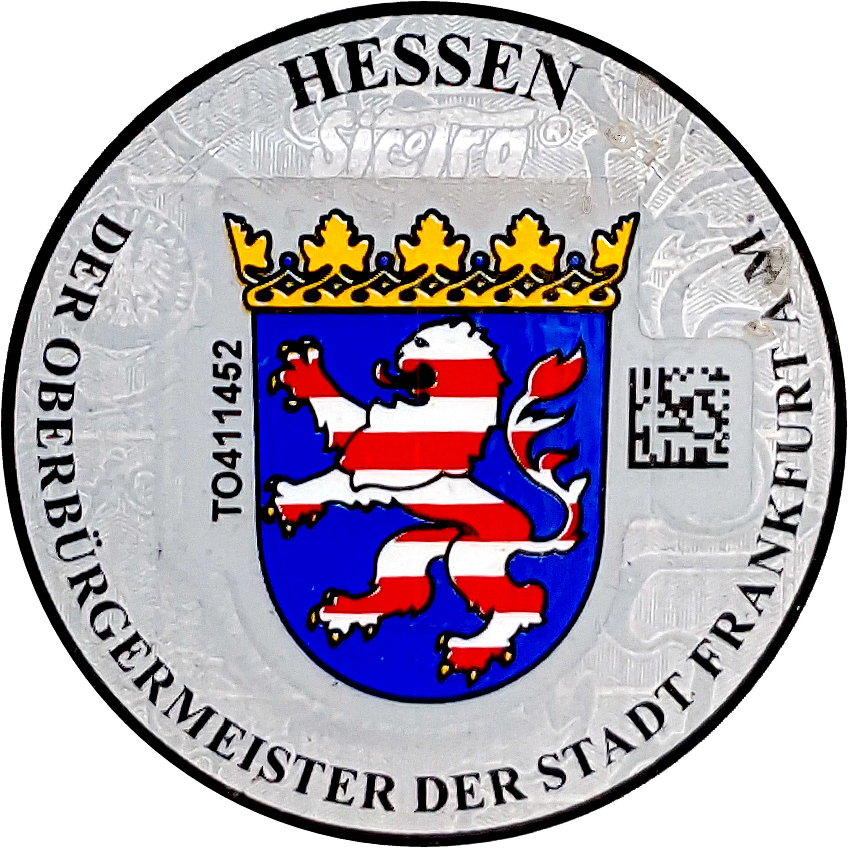 Kfz-Zulassungsplakette der Stadt Frankfurt am Main mit kleinem Siegel des Landes Hessen als Aufkleber in neuer Ausführung mit DataMatrix-Code für die internetbasierte Fahrzeugzulassung (i-kfz) seit 1. Januar 2015; Hersteller: Trautwein GmbH & Co, Produktgruppe: SicoTra®.